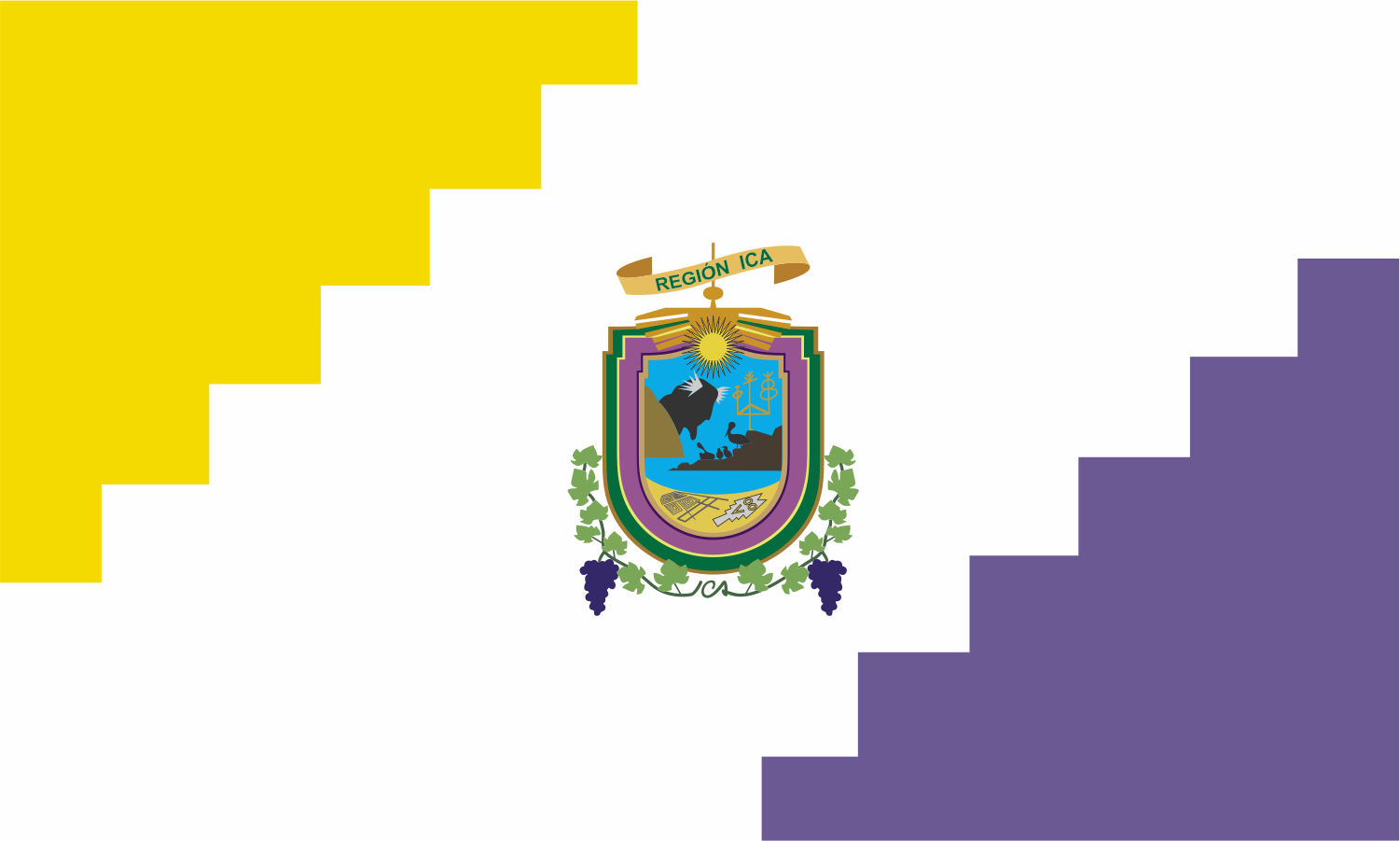 Bandera Región Ica